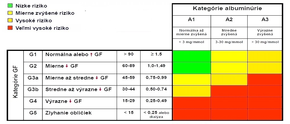 Prognóza CKD podľa GF a albuminúrie